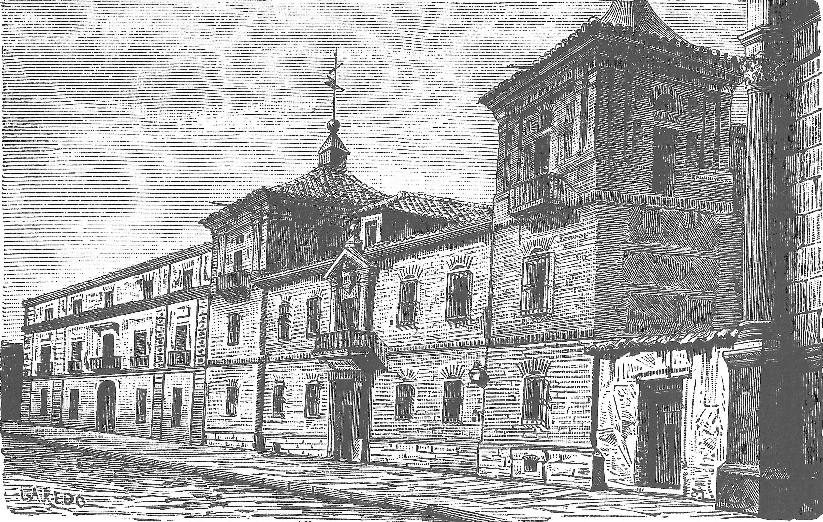 Colegio menor de San Felipe y Santiago, conocido popularmente como Colegio del Rey, vinculado a la antigua Universidad Cisneriana de Alcalá de Henares. Desde 1991 es sede del Instituto Cervantes. Grabado de Manuel Laredo, publicado en 1882, en el libro de Esteban Azaña titulado "Historia de la ciudad de Alcalá de Henares".